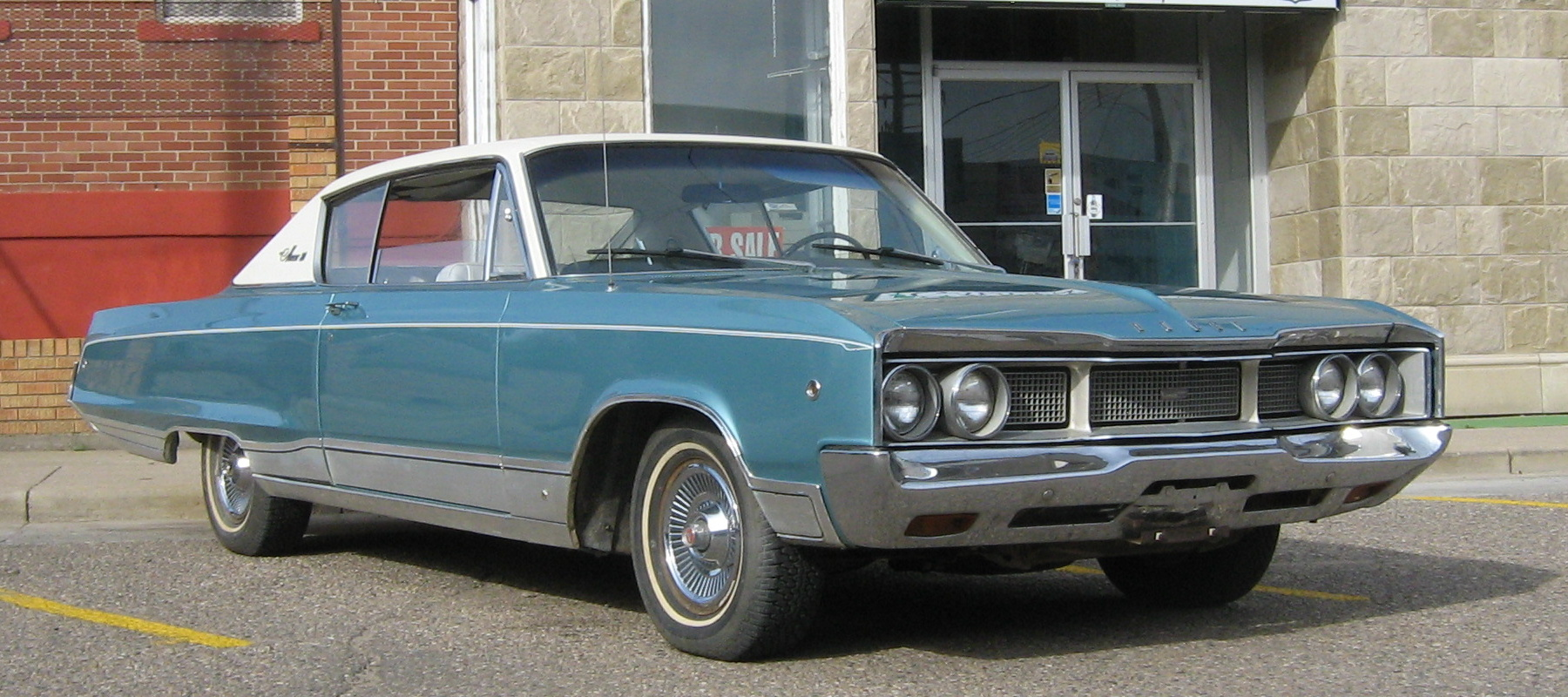 1968 Dodge Monaco 2-door hardtop